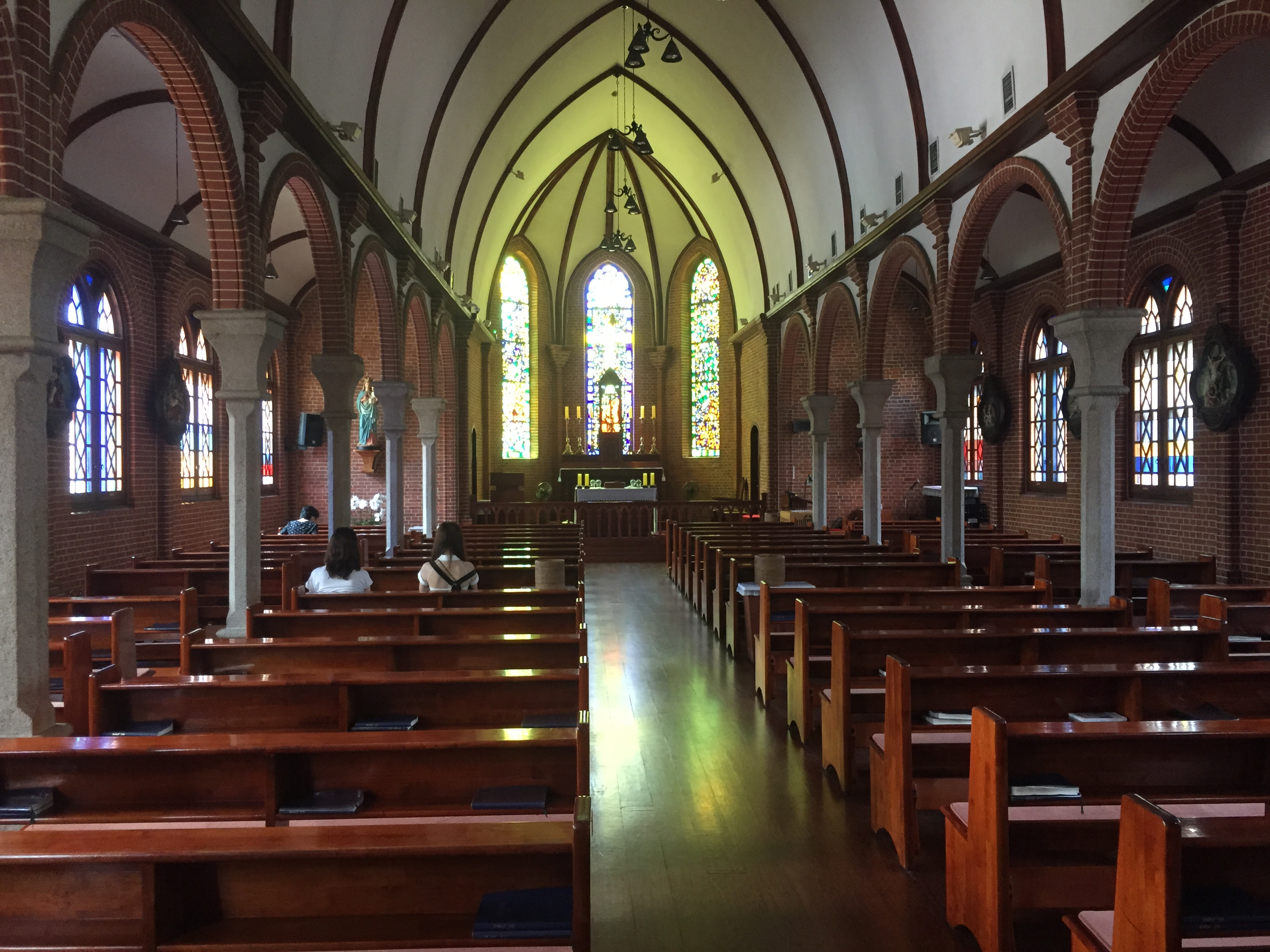 천주교 서울대교구 중림동 약현성당 내부